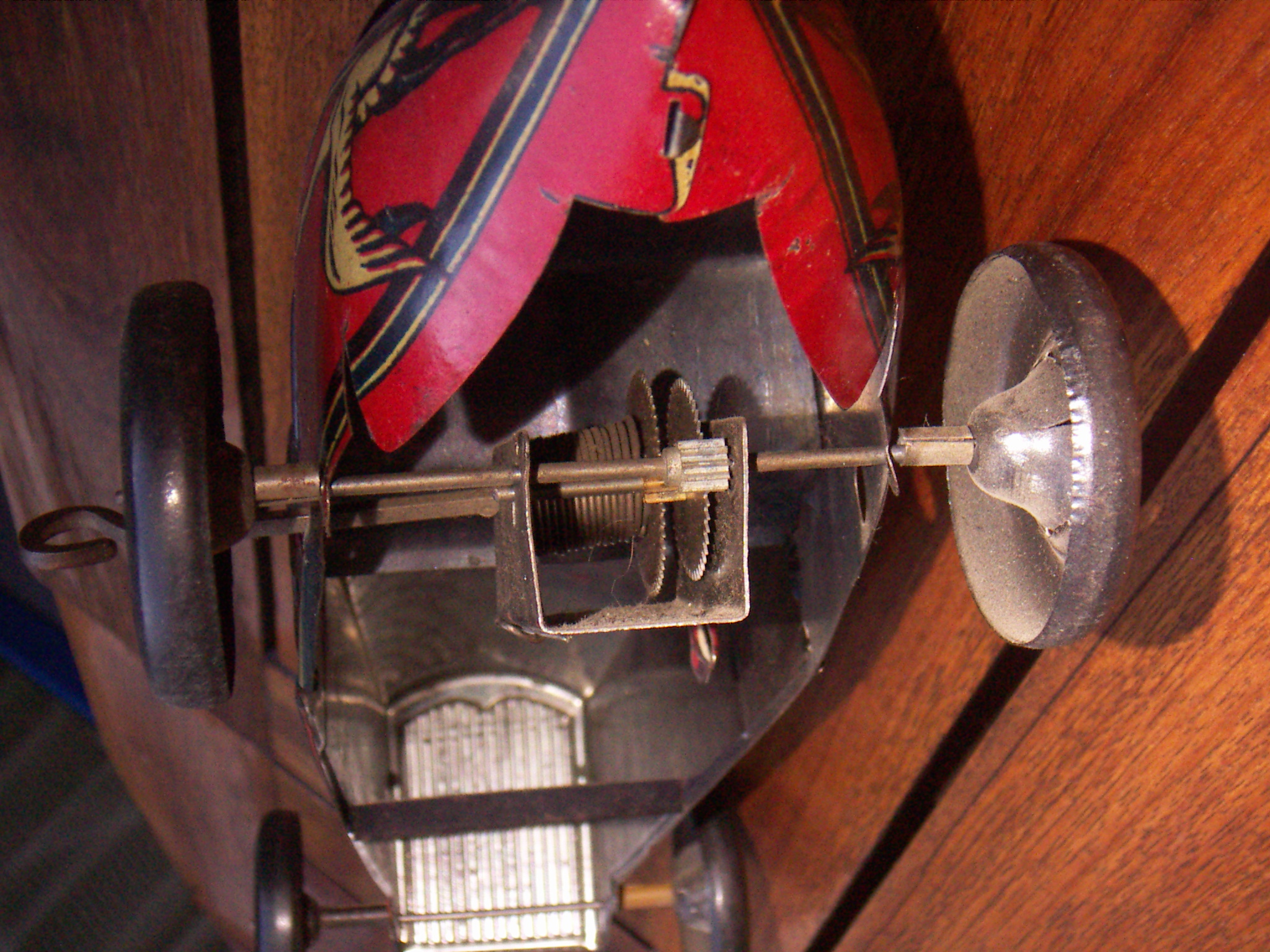 Mecanisme de corda d'un cotxe de joguet de llauna